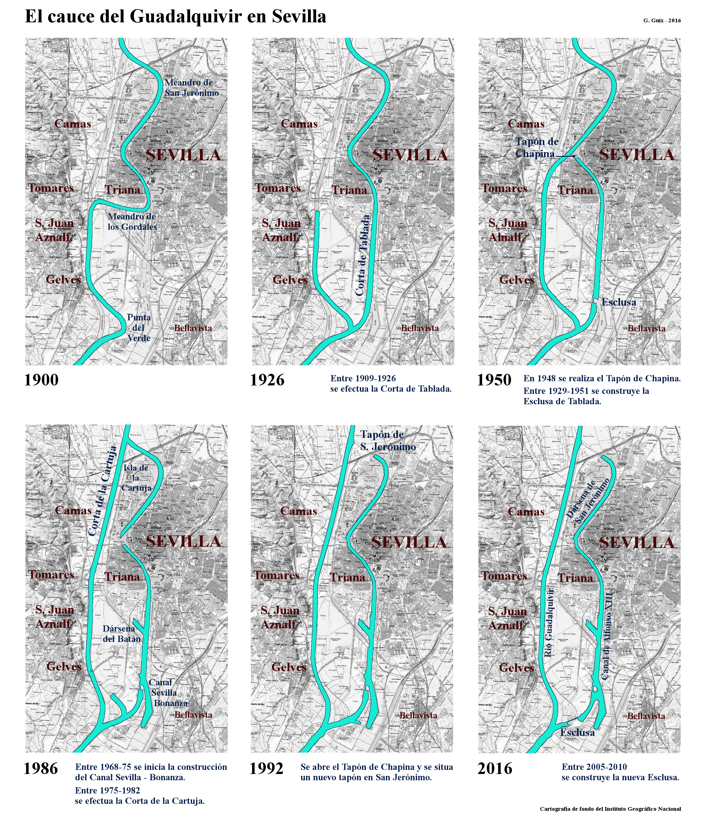 Llit del Guadalquivir a Sevilla